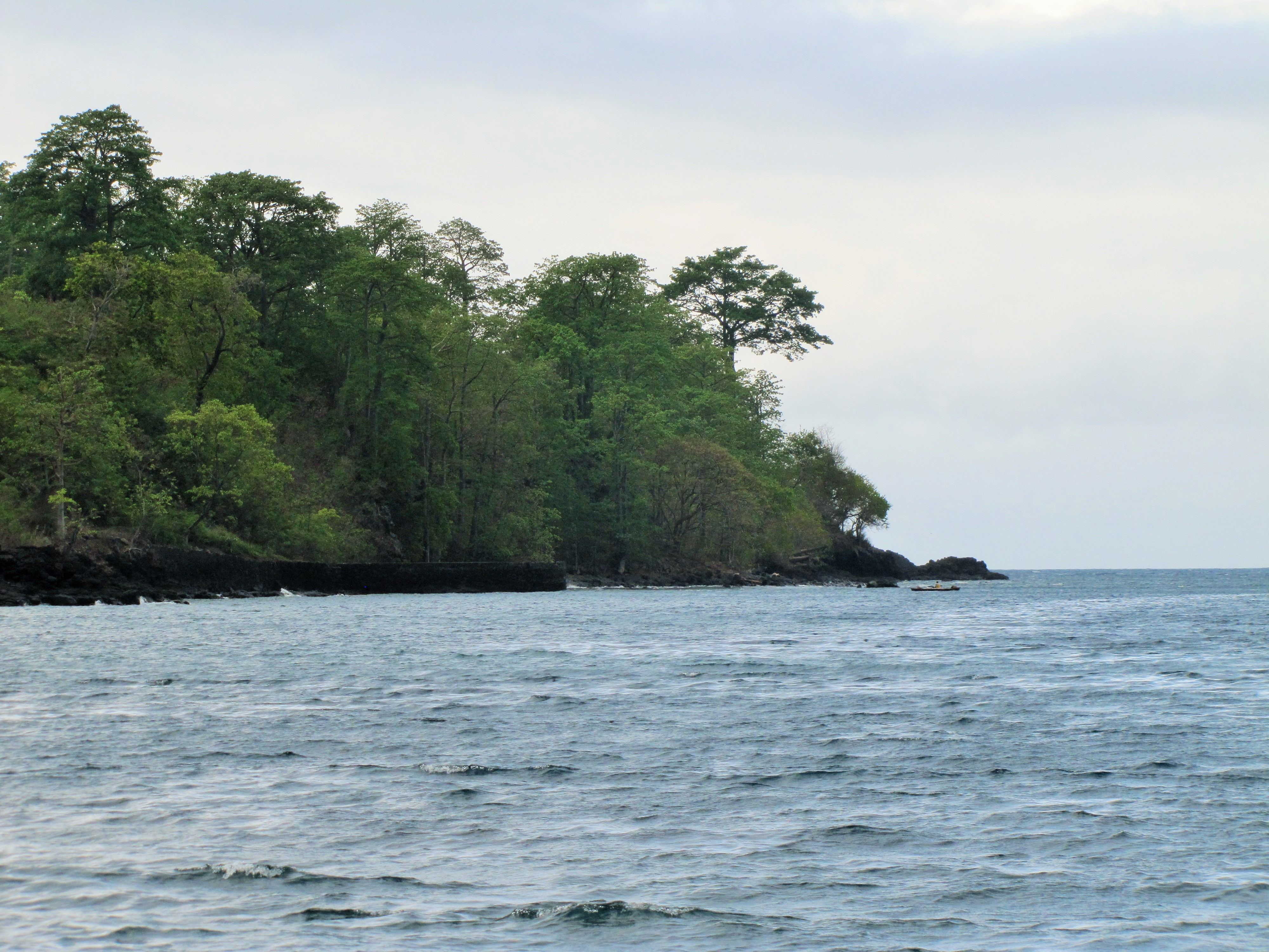 Sao Tome Ponta Figo Coast